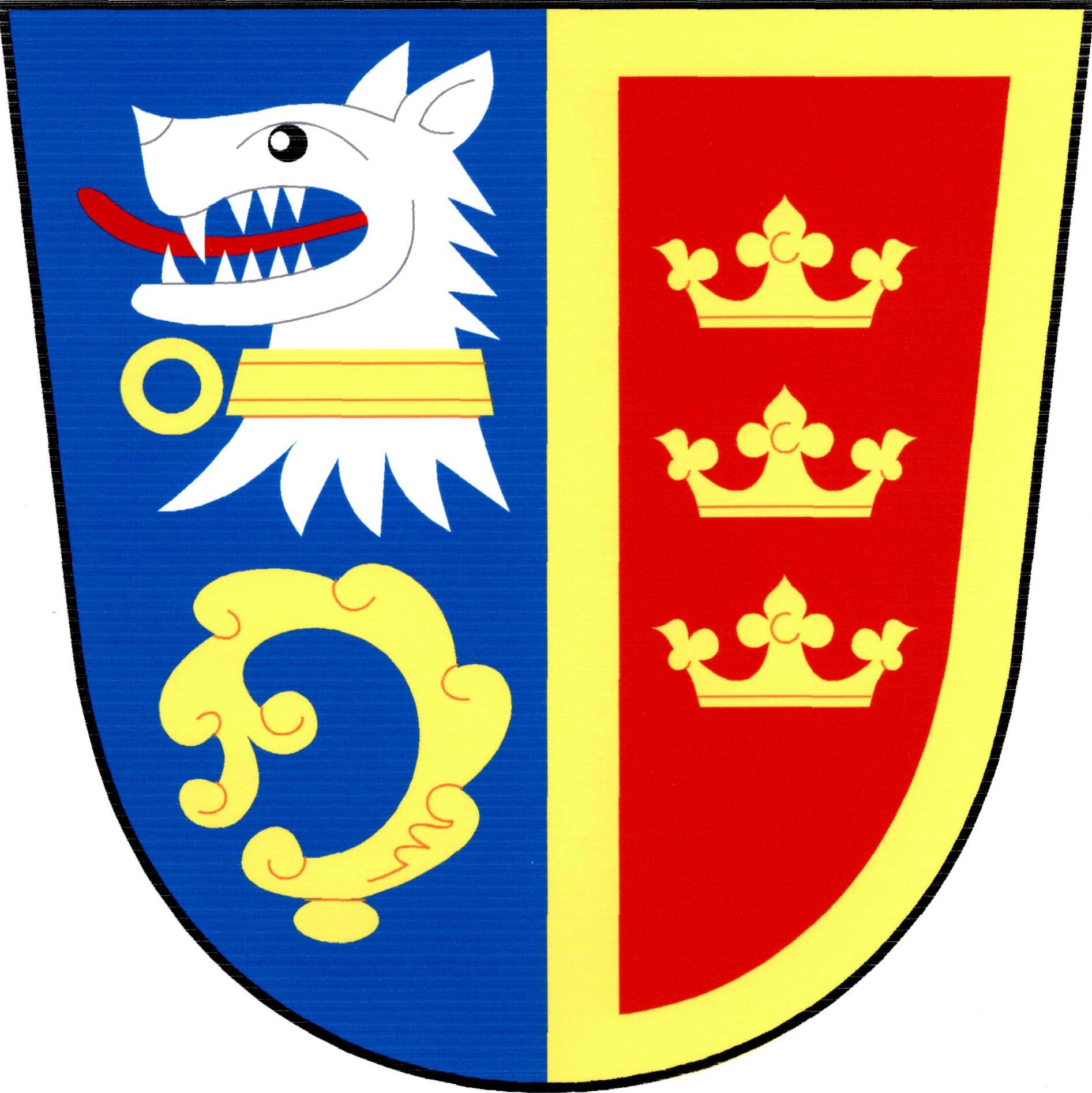 Znak obce Třebešice